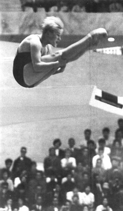 Zentralbild-AP Tele Wen-Zi 12.10.1964 XVIII. Olympische Sommerspiele Tokio 1964. Erste Goldmedaille für die DDR durch Ingrid Engel-Krämer. UBz.: Im Kunstspringen der Damen holte sich Ingrid Engel-Krämer, wie schon in Rom 1960, die Goldmedaille. Ingrid in Aktions.